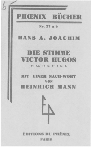 Hans Arno Joachim Die Stimme Victor Hugos 1935 Cover